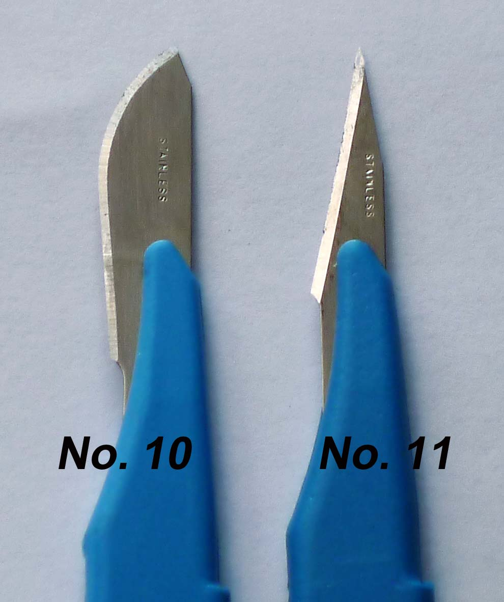 Zwei Skalpellklingenformen, links Fig. 10, rechts Fig. 11